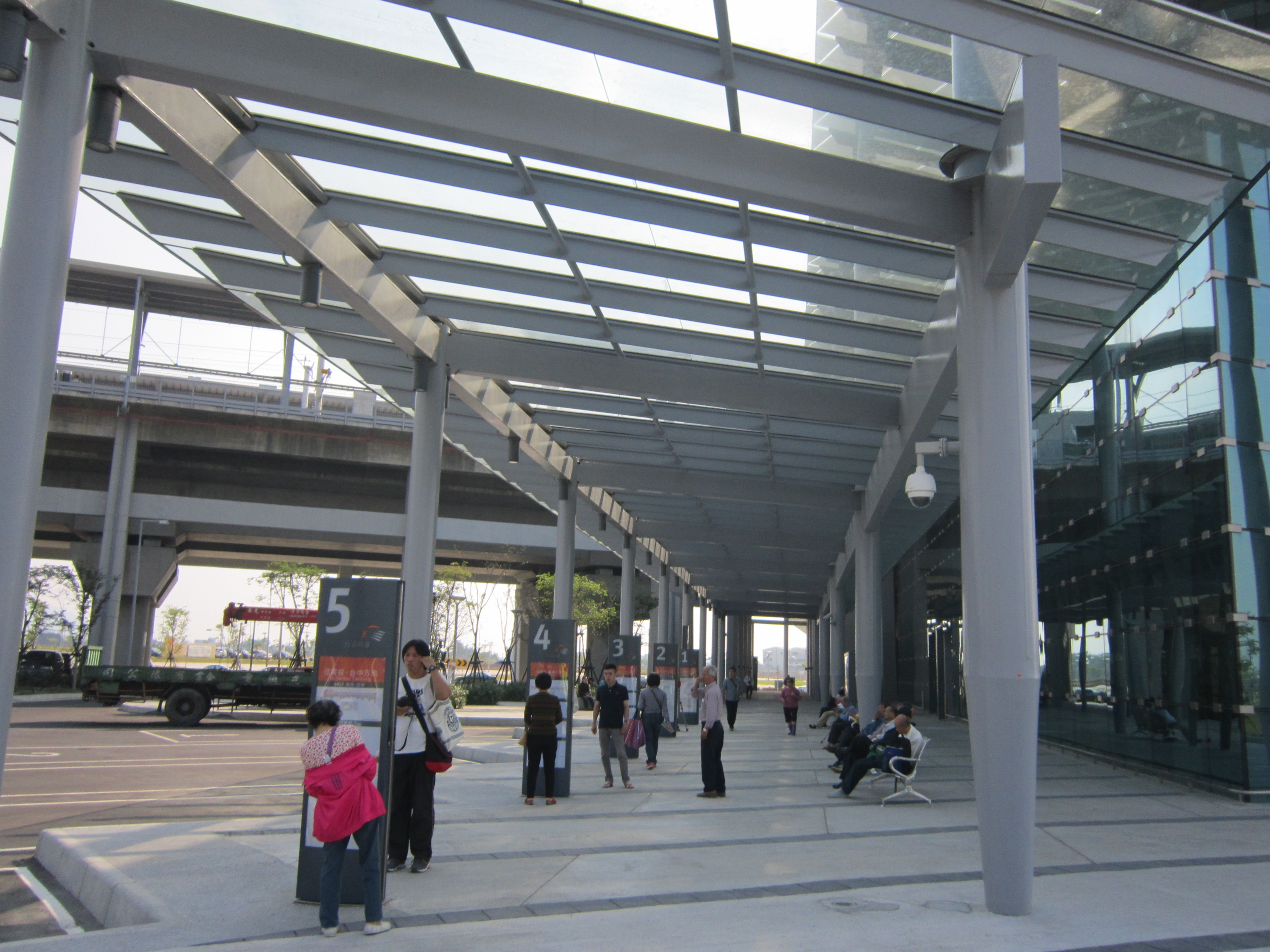 中文（台灣）: 彰化高鐵站公車轉運站